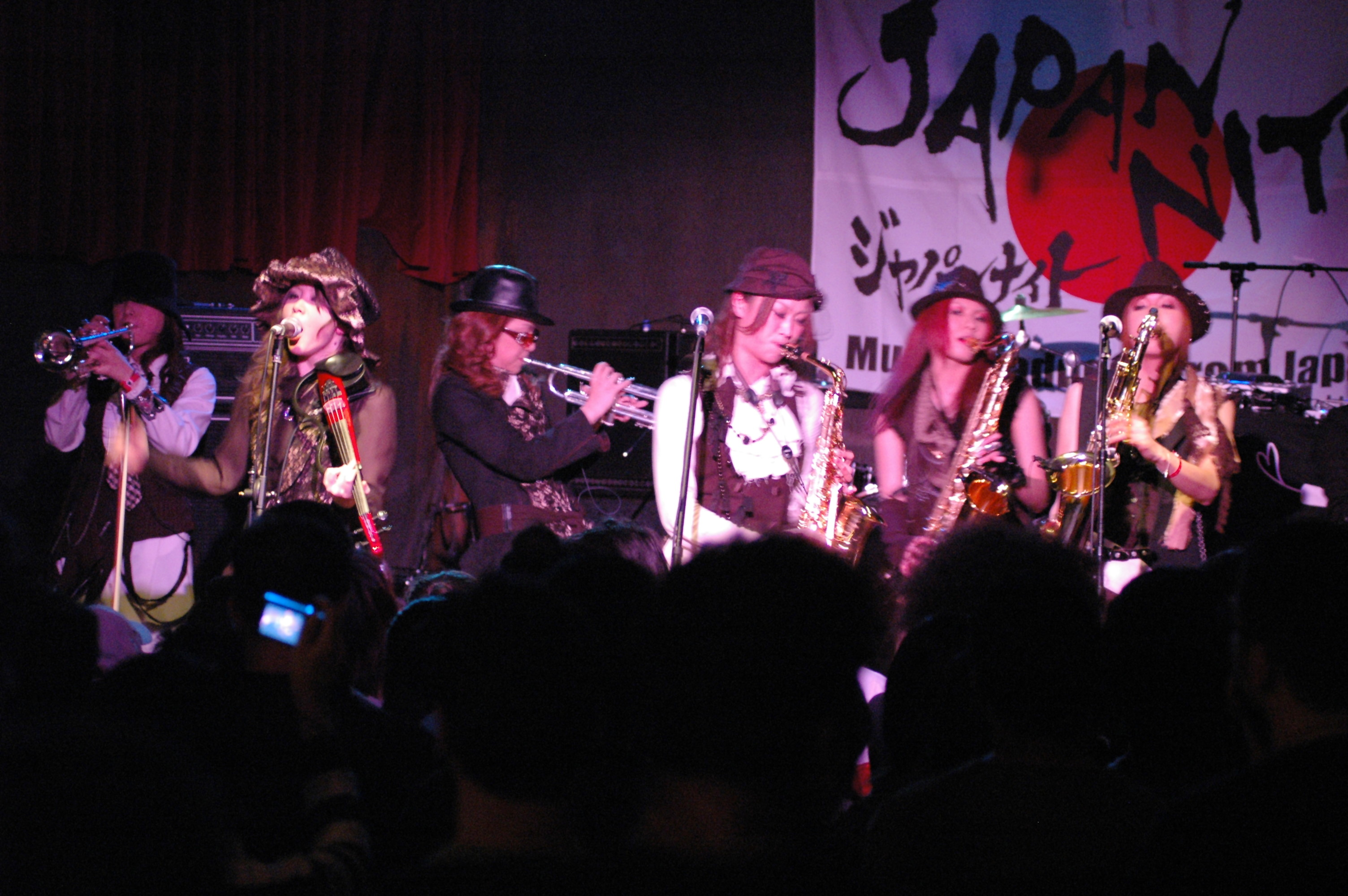 JN07pistolvalve4